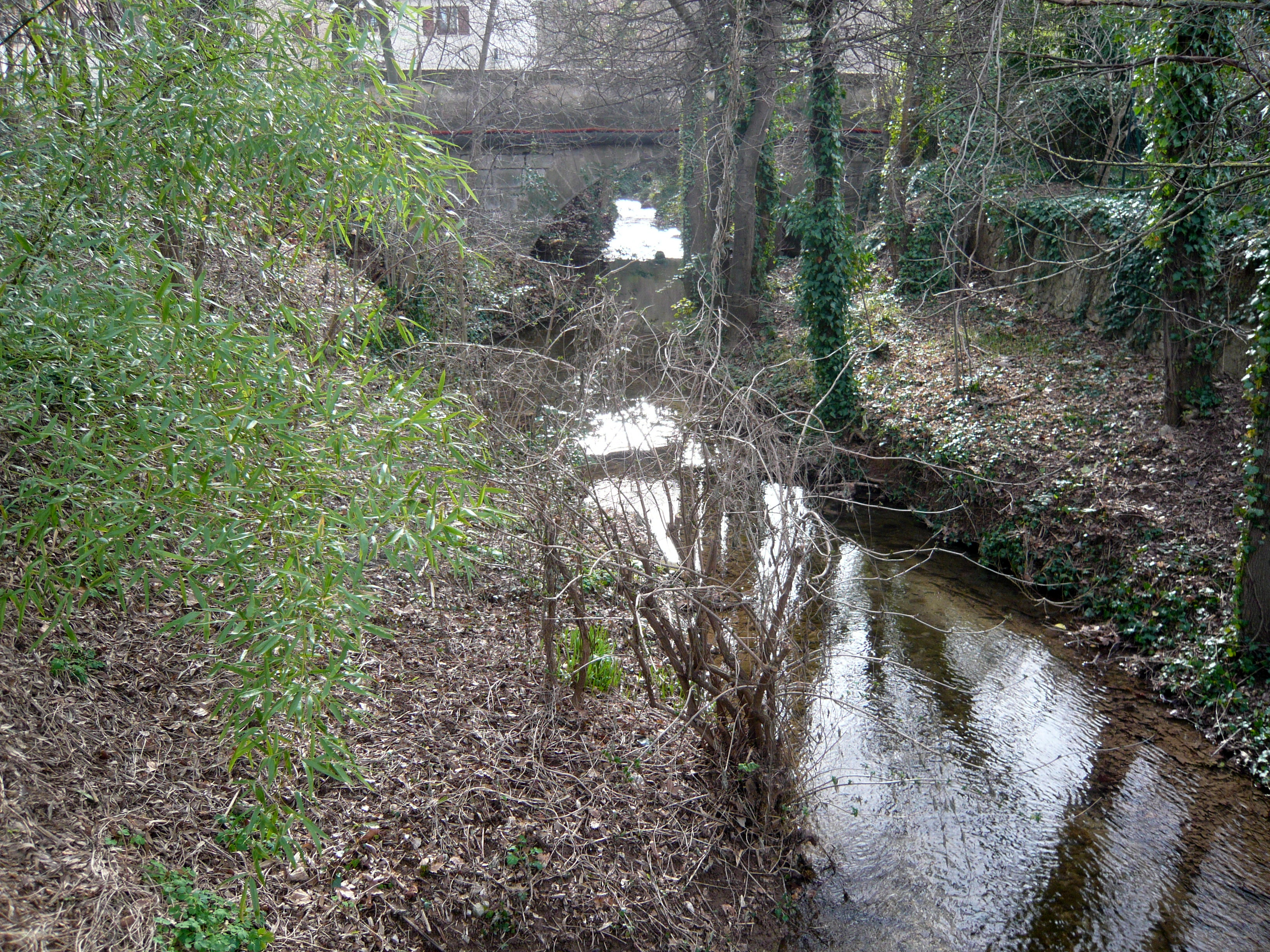 La Cause au pont de Palette, vue aval, le Tholonet (France).